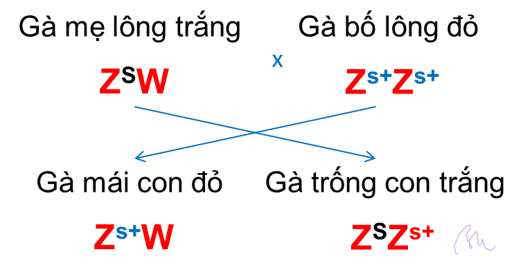 Sơ đồ lai gà mái trắng (SW) với gà trống đỏ (s+s+) sinh gà trống con luôn có lông trắng (s+W) dễ nhận biết ngay từ khi mới nở.